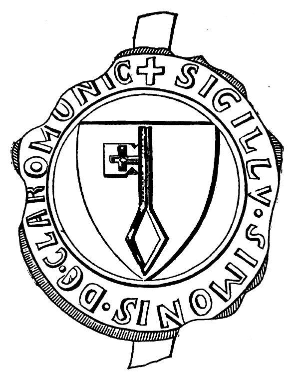 Blason des seigneurs de Clefmont : d'une clef d'argent posée en pal sur champ d'azur.